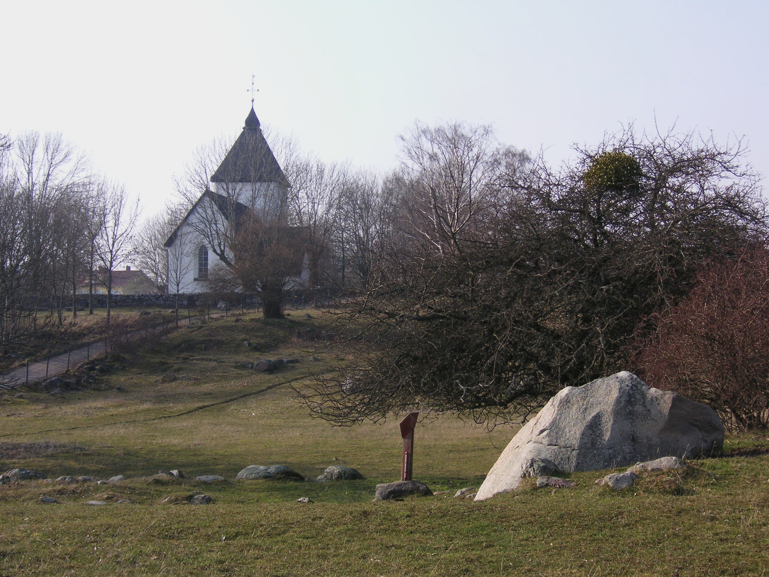 Hovegården på Adelsön, runsten "Håkanstenen", med Adelsö kyrka